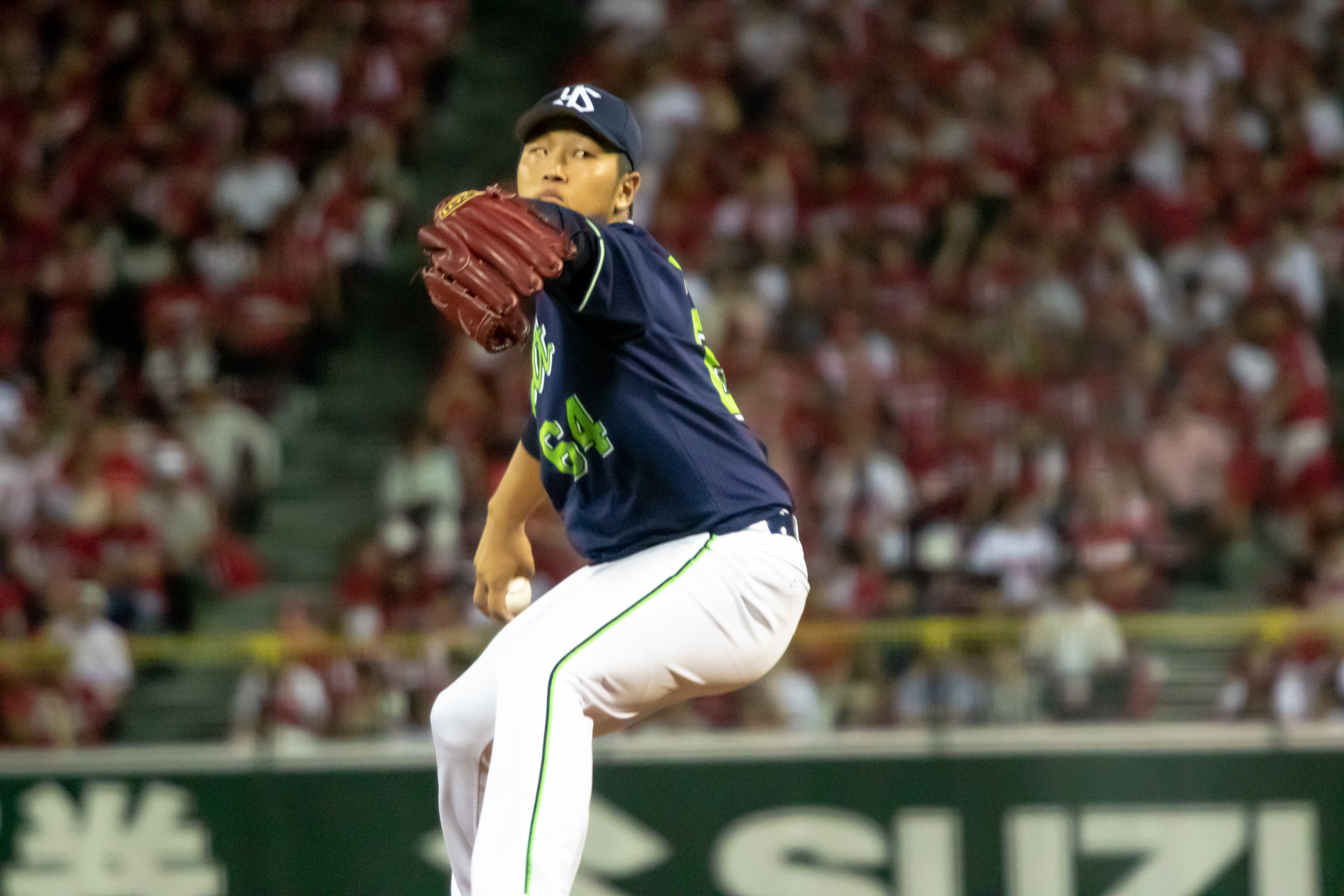 2018年7月4日 マツダスタジアム